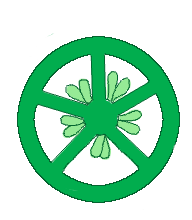 Morfología del gineceo, placentación axilar (una versión), sección transversal. Según Simpson (2005) Plant Systematics.